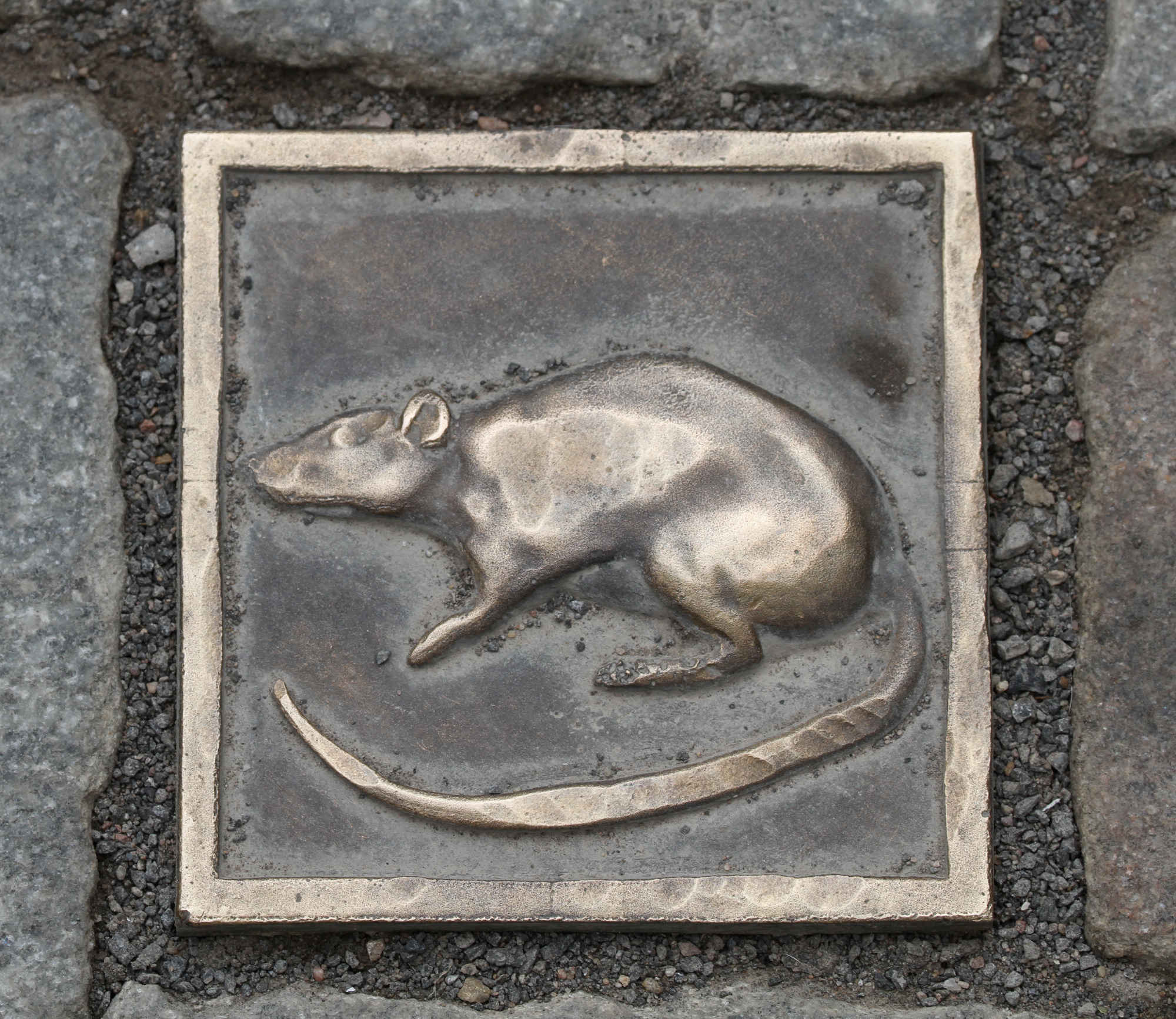 Pflasterstein in der Fußgängerzone Hameln